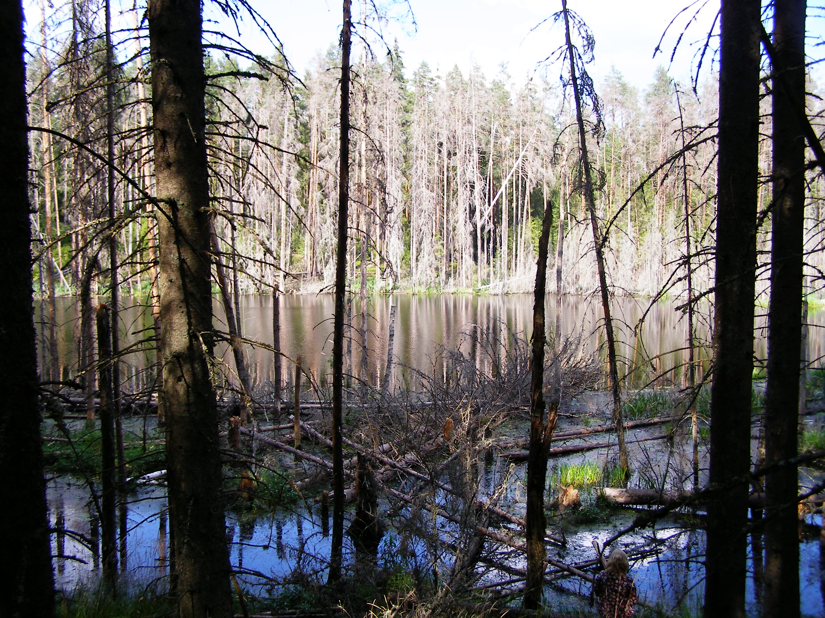 Mustjärv Karula rahvuspargis, vaade edelast.